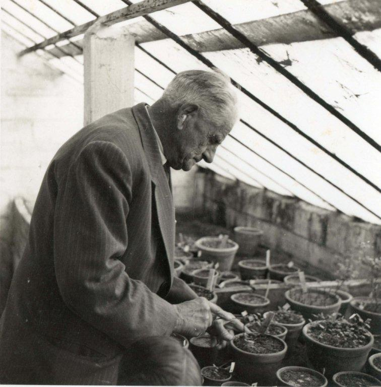 Pere Dot a l'hivernacle del seu viver a "Sol i Vent"